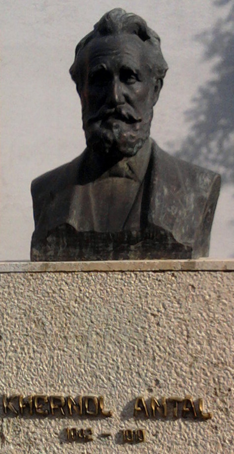 Kherndl Antal mellszobra, Zselíz, városházával szemben